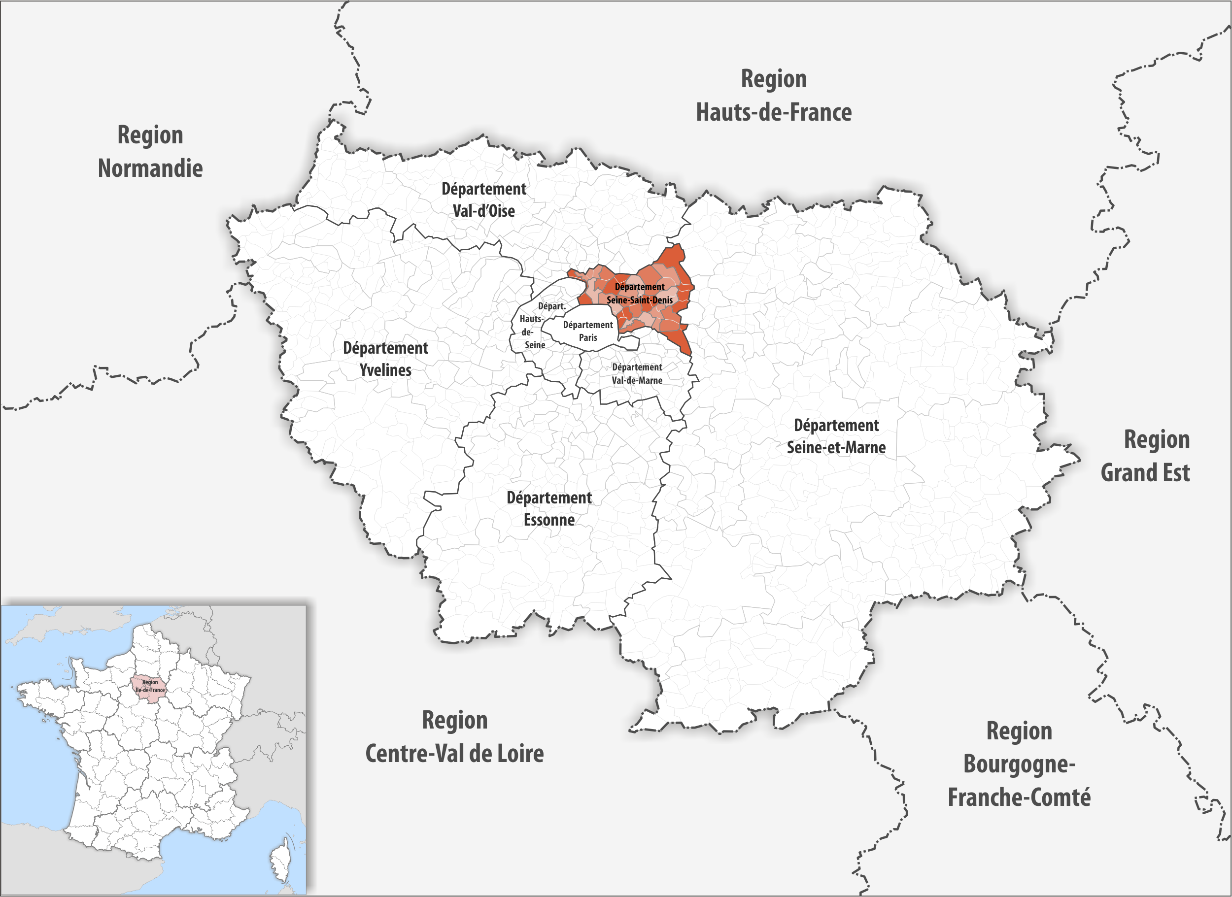 Lage des Departements Seine-Saint-Denis